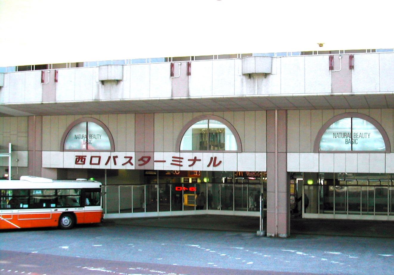 Kasiwastation,Kasiwacity,Chiba,Japan